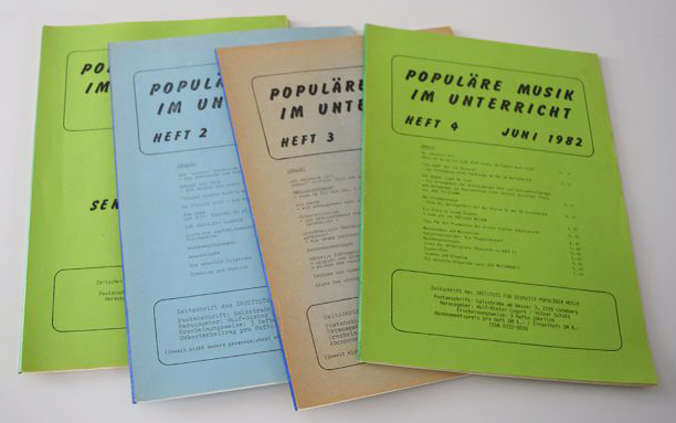 magazine music from Lugert Verlag, Germany